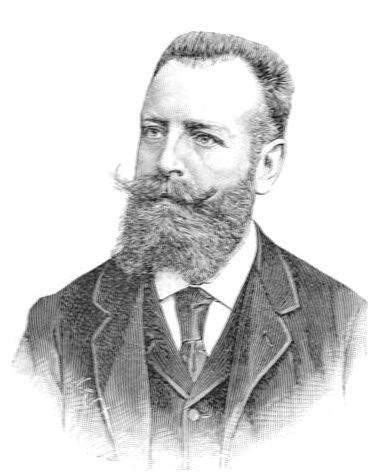 Jean-Ernest Gay, conseiller municipal du quartier de la Porte-Dauphine.